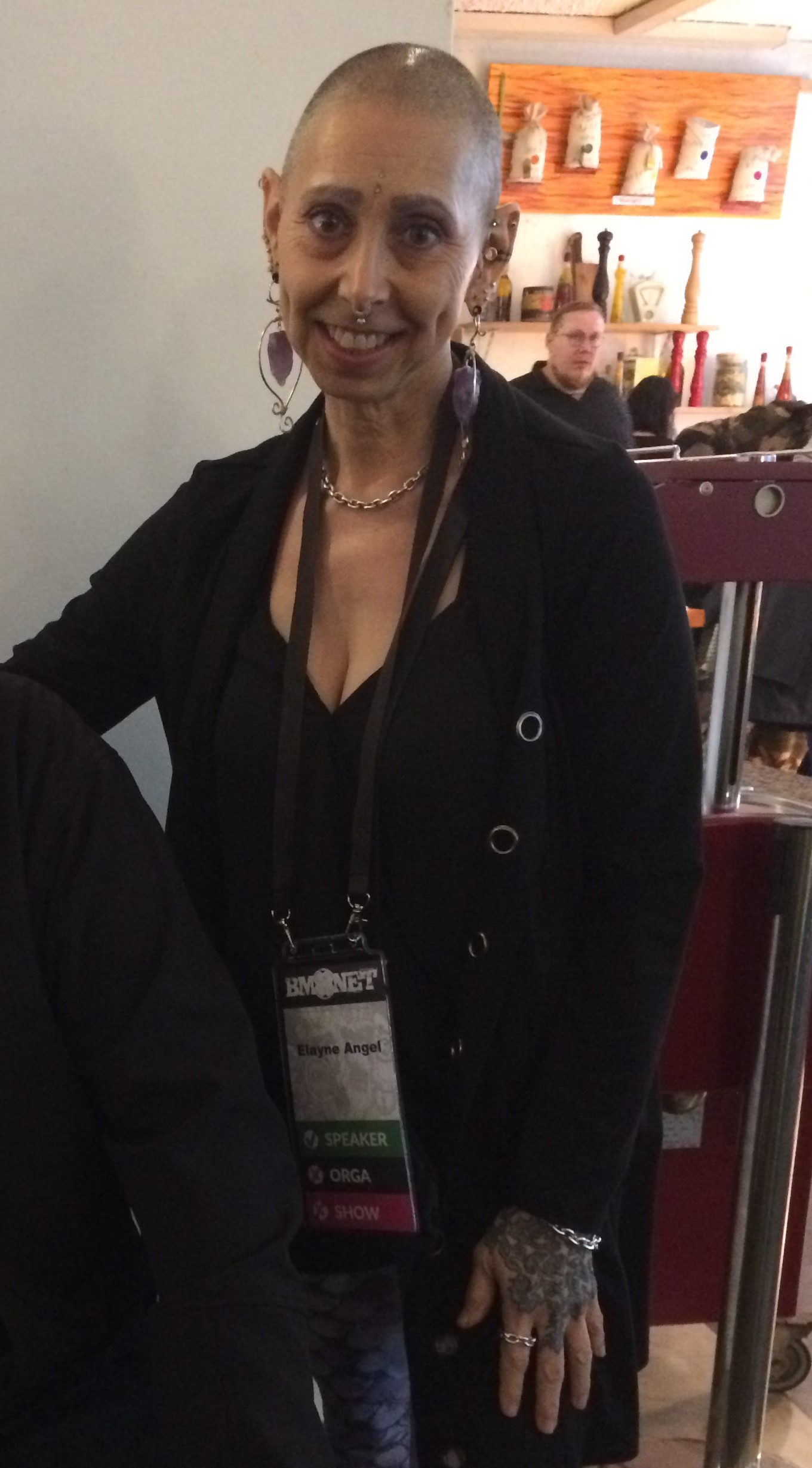 Elayne Angel auf der Conference 2019 in Essen